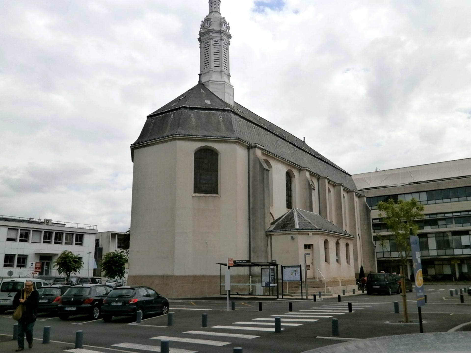 chapelle de l'hôpital Bretonneau de Tours dédiée à saint Roch